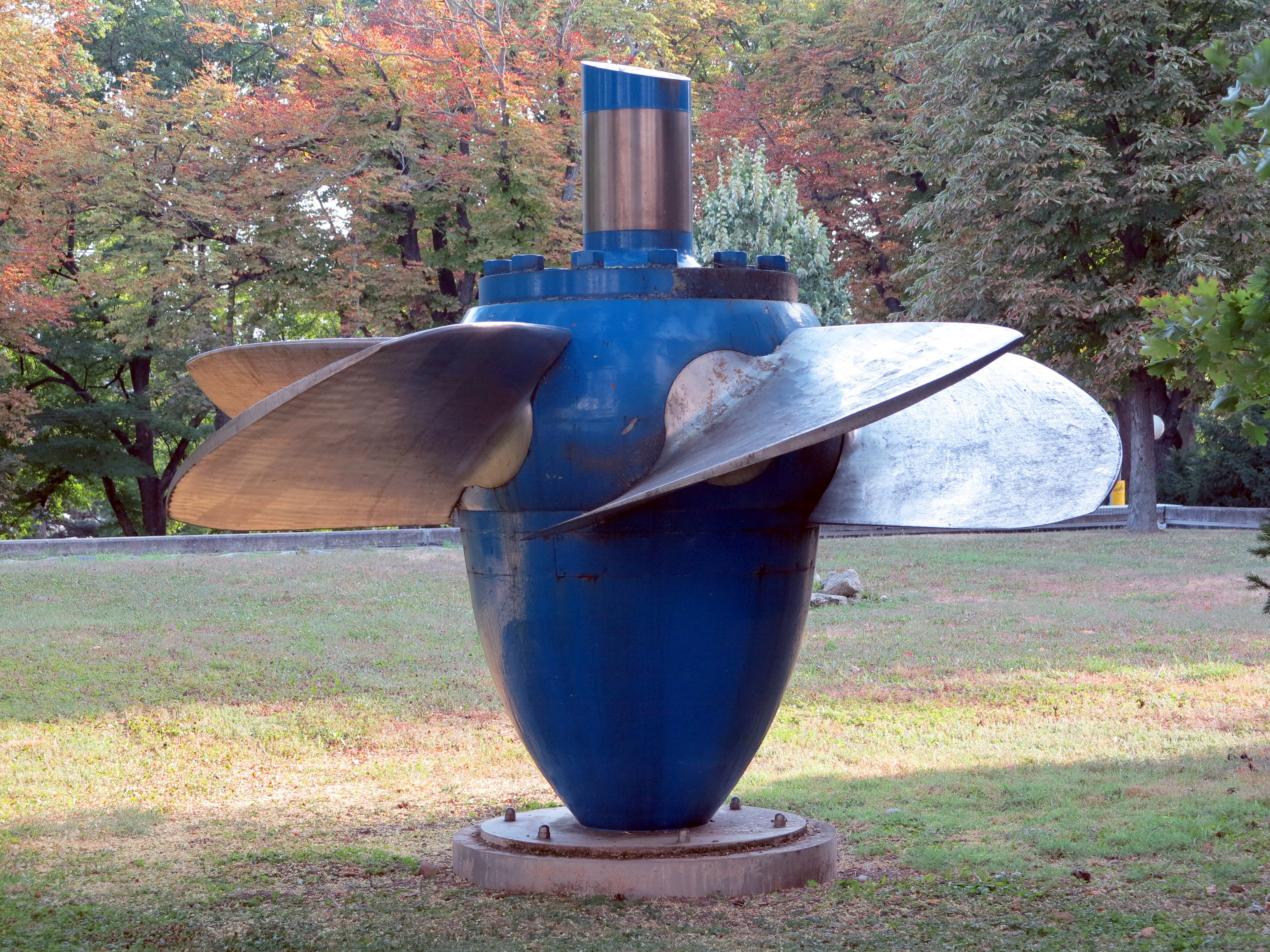 Kaplan Turbine Schaustück in Würdigung des Viktor Kaplan ausgestellt vor dem Gebäude des Technischen Museums Wien.